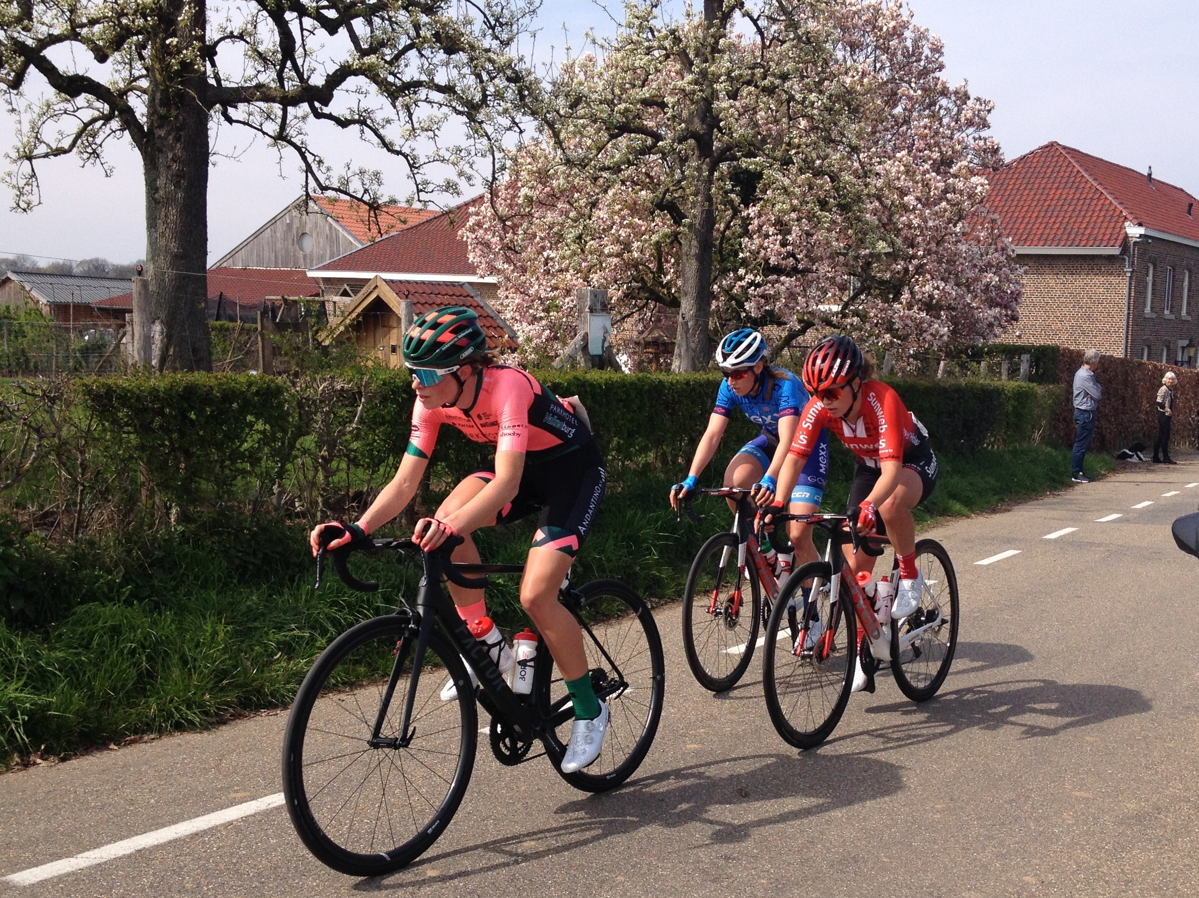 Volta Limburg Classic 2019 voor vrouwen met start en finish in Eijsden, Limburg, Nederland